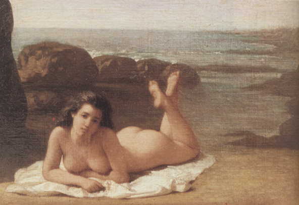 studio